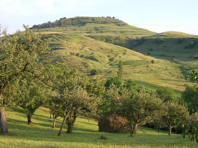 Kalotaszegi táj (Erdély)